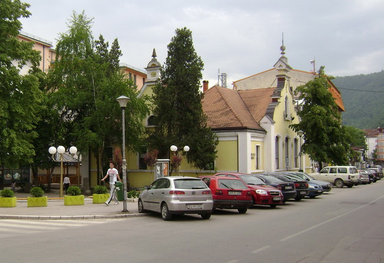 Библиотека и музејска збирка изграђена је 1910. године за вријеме Аустроугарске окупације. Тада је служио као Официрски дом тј. Касина.